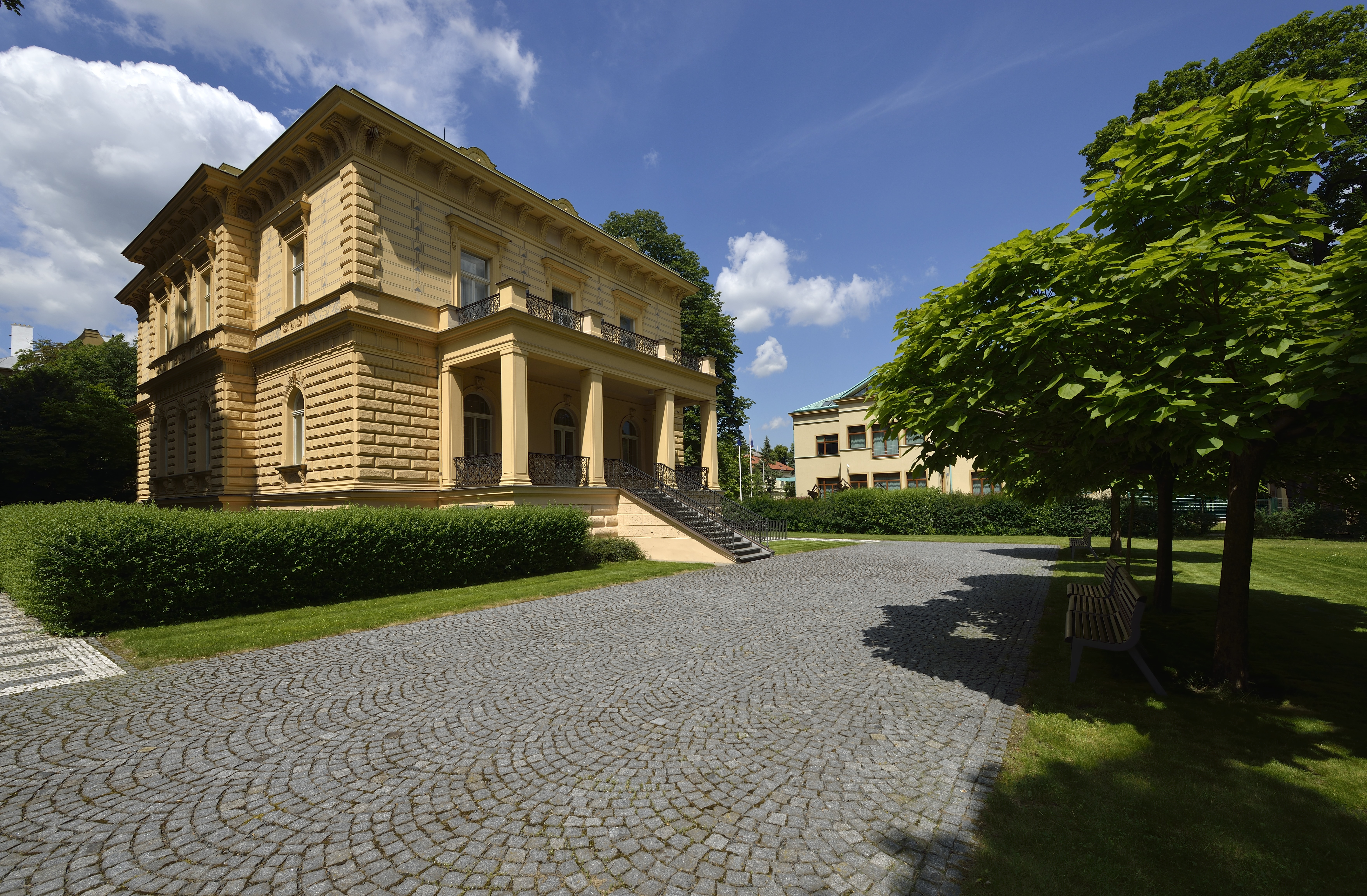 Pelléova vila - východní průčelí se salou terrenou situované do zahrady